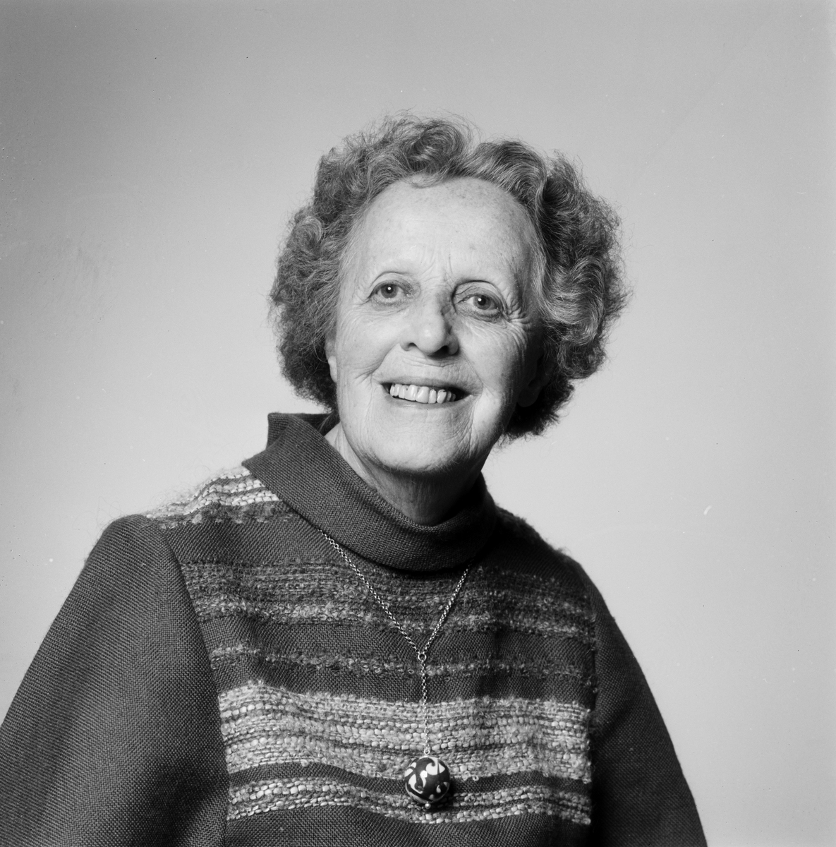 Portrett